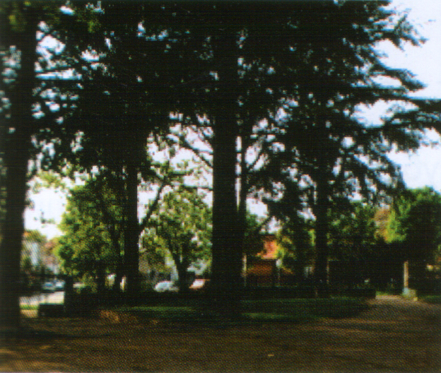 Osma beogradska gimnazija